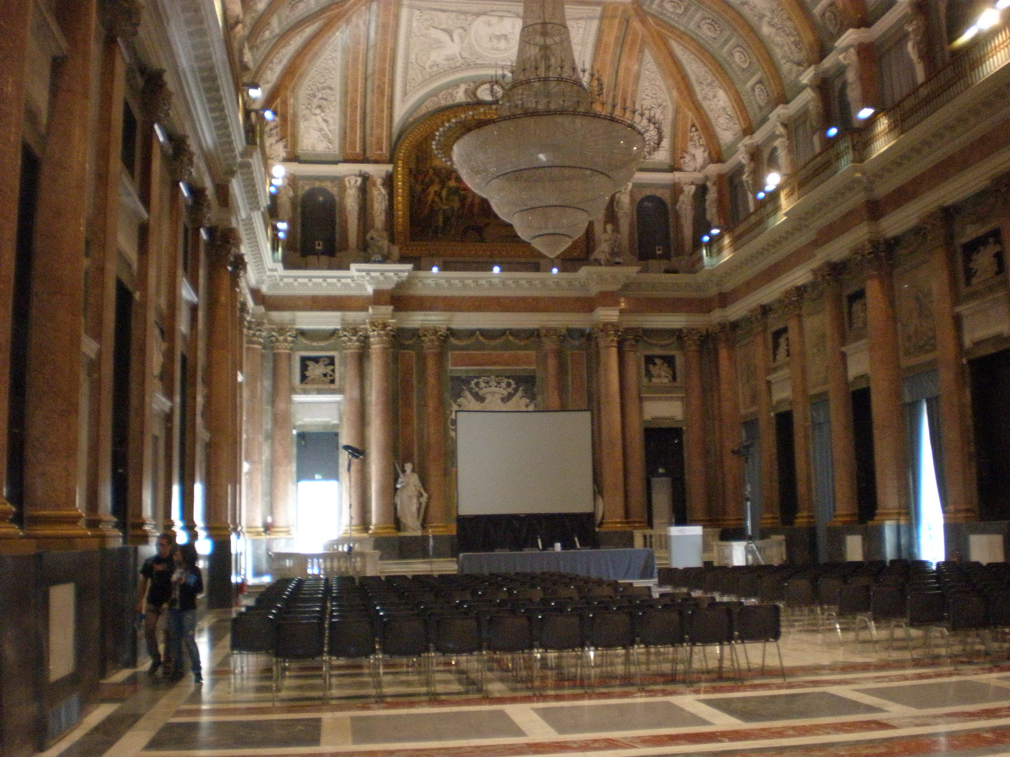 Palazzo Ducale di Genova This is a photo of a monument which is part of cultural heritage of Italy.